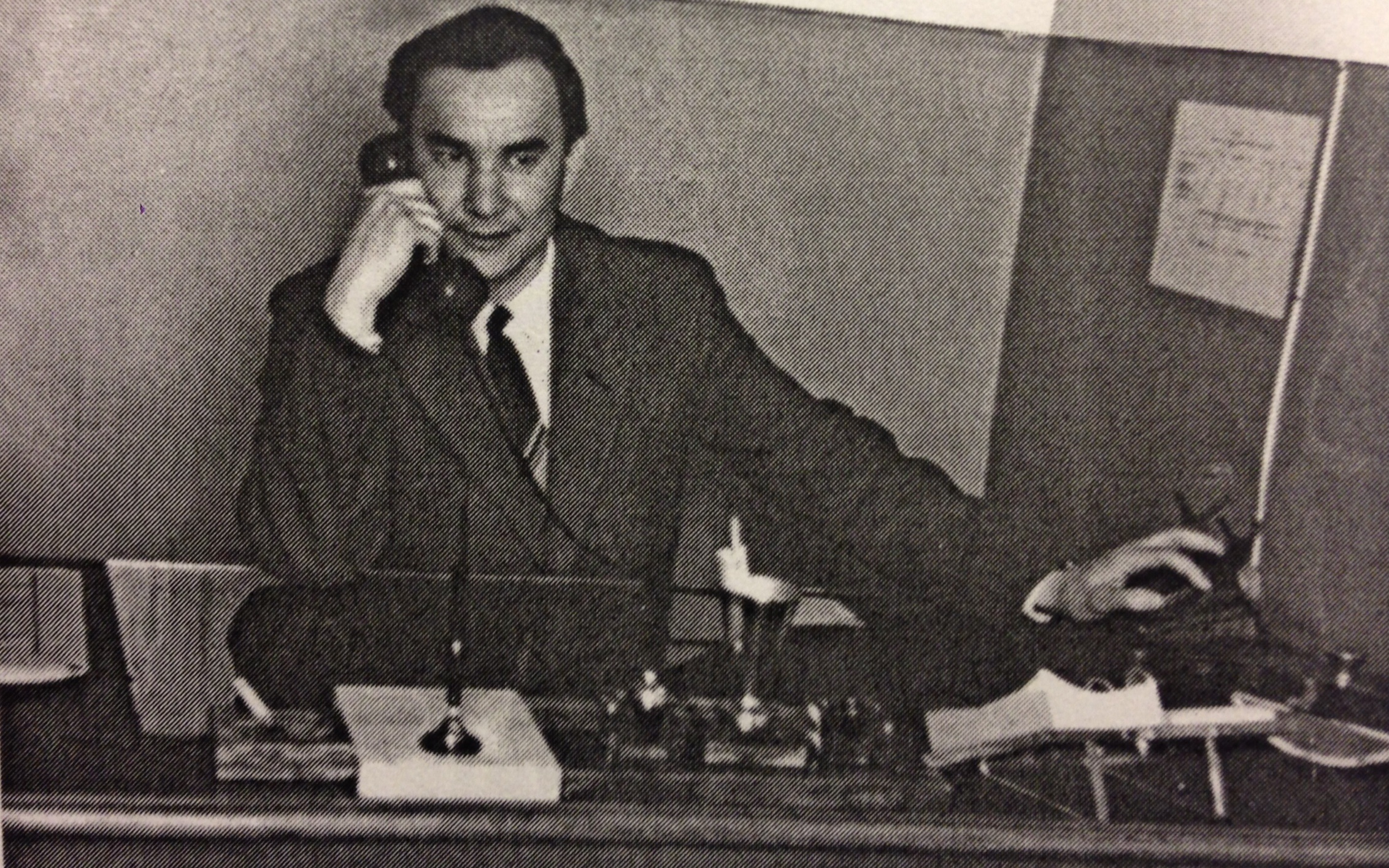 Қазақша (кирил): Темірғали Нәренұлы, 1950-ші жылдары